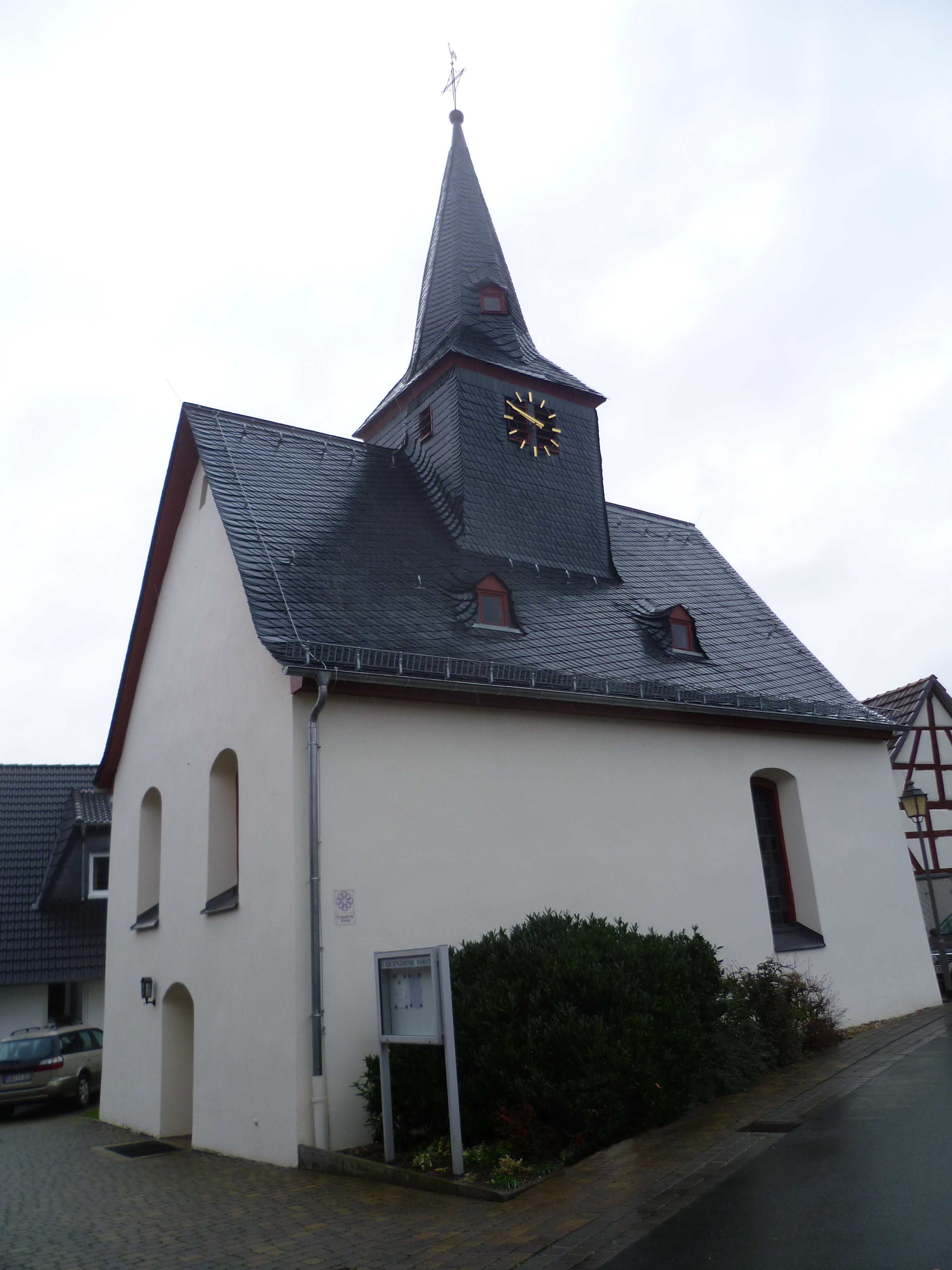 Evangelische Kirche Idstein Dasbach. Gerüchten zufolge steht sie auf den Fundamenten eines früheren Limesturms.